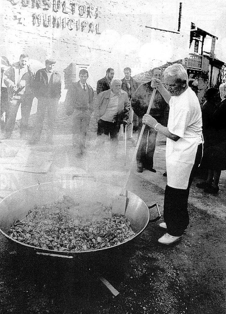 I Festa del Nap 1991 , fent l'arros